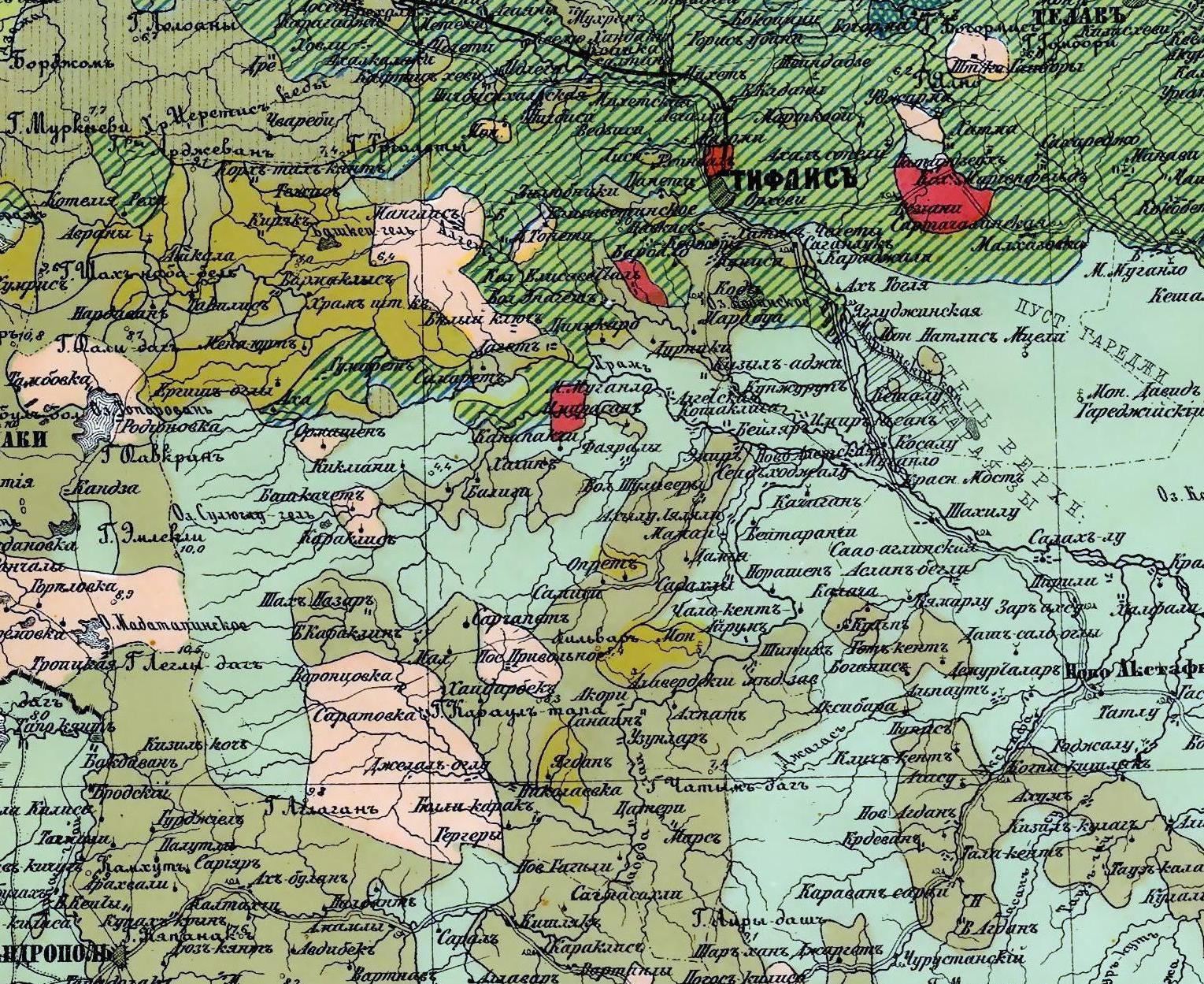 Этнографическая карта Тифлисского уезда, 1880 г. (Масштаб: 1:1080000).